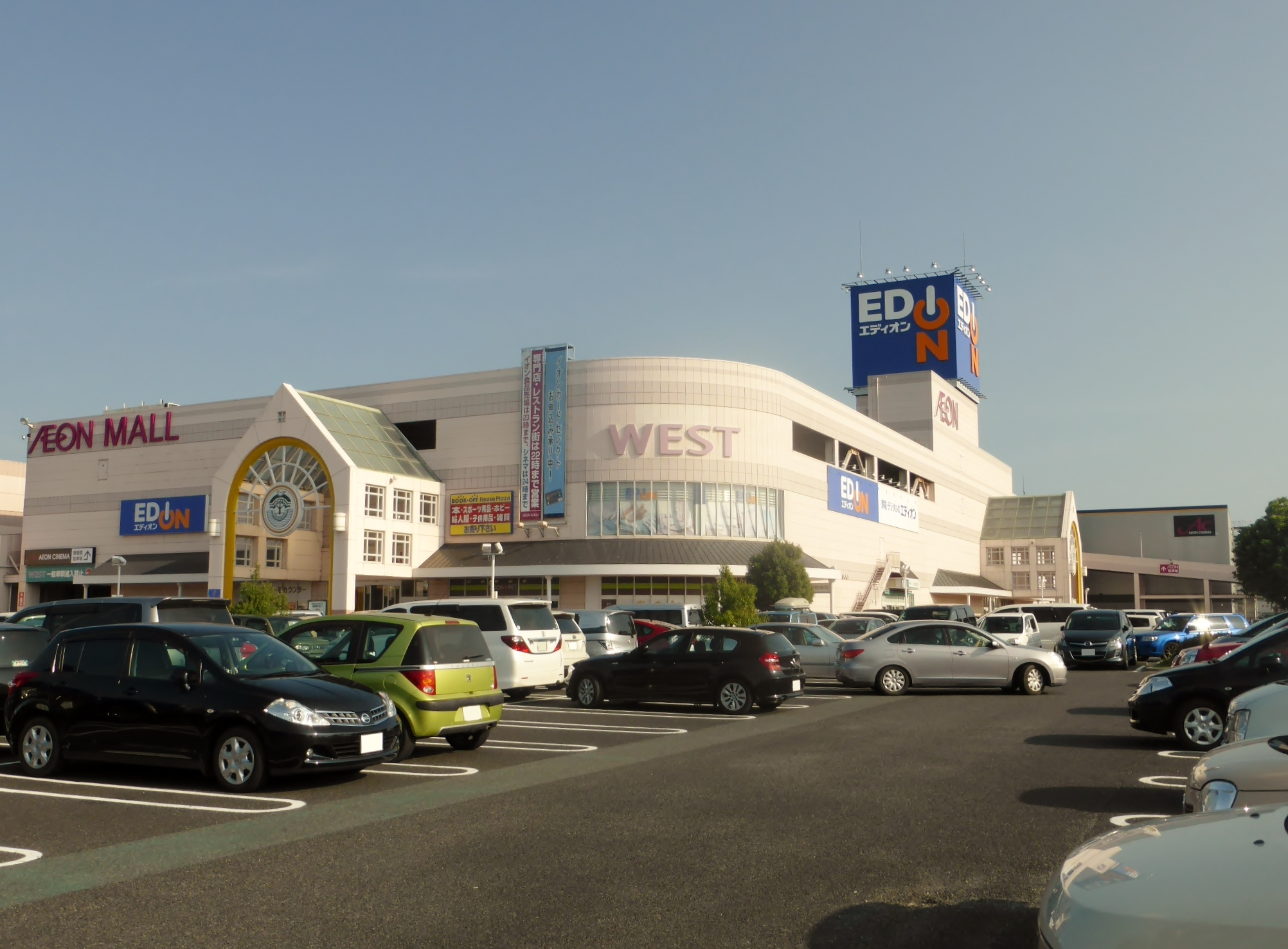 イオンモール鈴鹿WEST棟を撮影